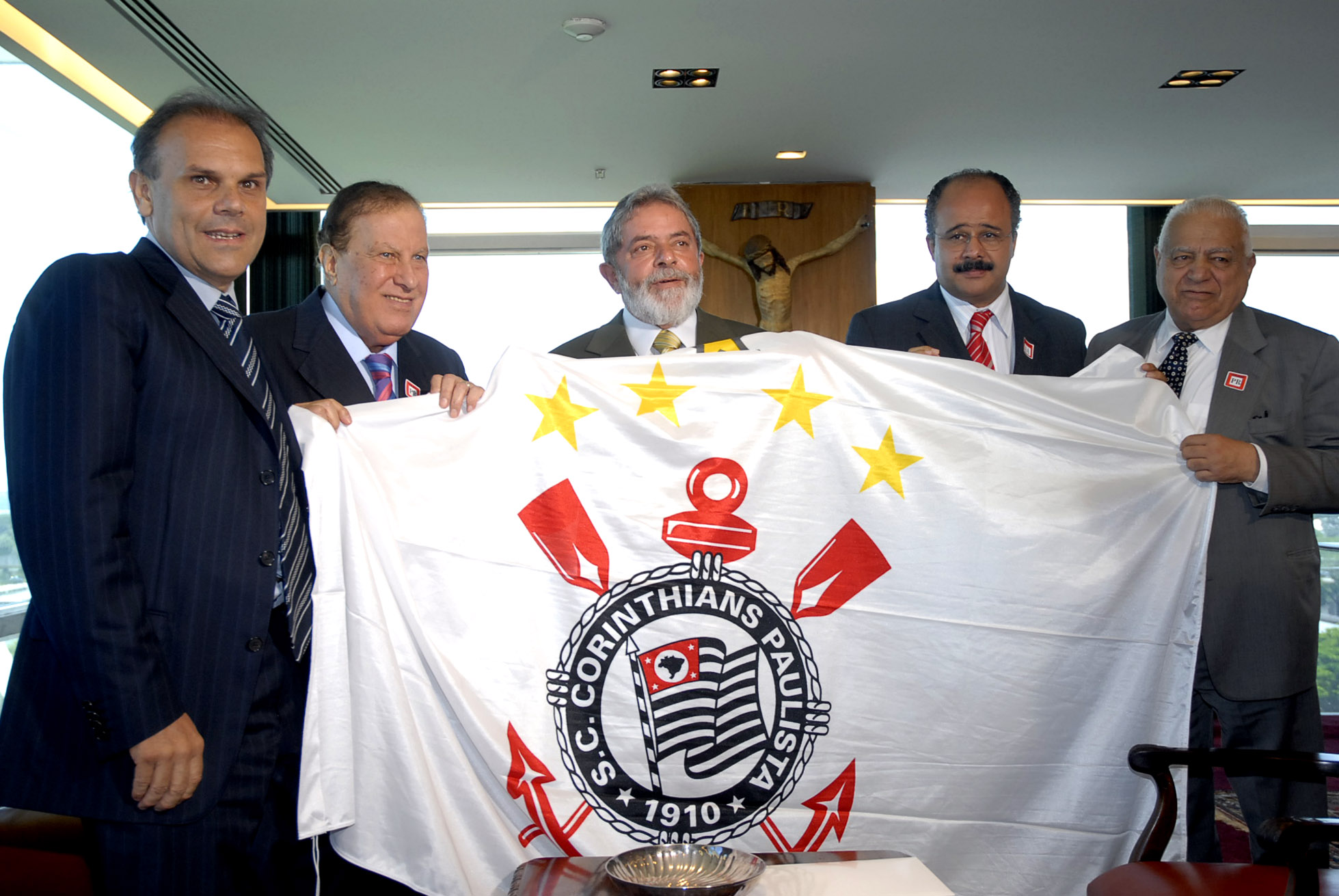 Brasília - presidente Luiz Inácio Lula da Silva recebe a diretoria do Corinthians. À esquerda, Alberto Dualib, diretor-presidente do clube